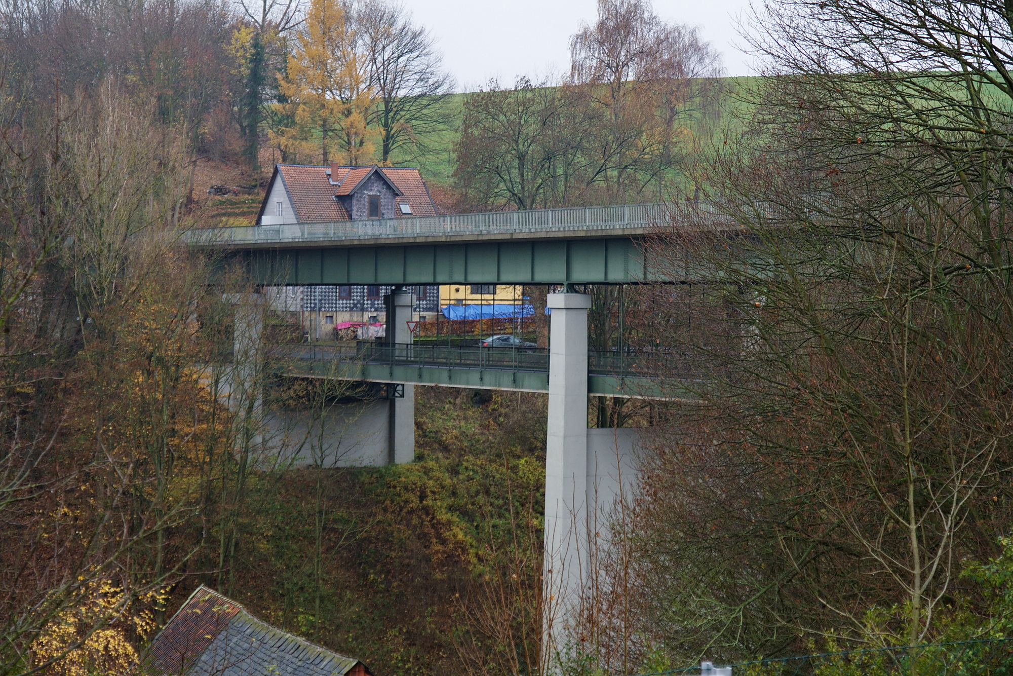 Zweietagenbrücke in Kuventhal (Einbeck), Niedersachsen, Deutschland